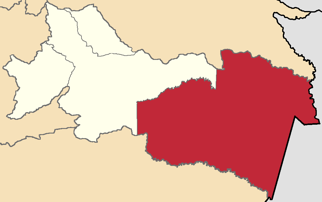 Mapa localizador del cantón en Orellana, Ecuador